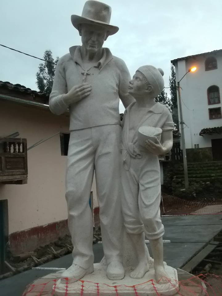 Estatua del padre Ugo con un niño del Ande peruano.